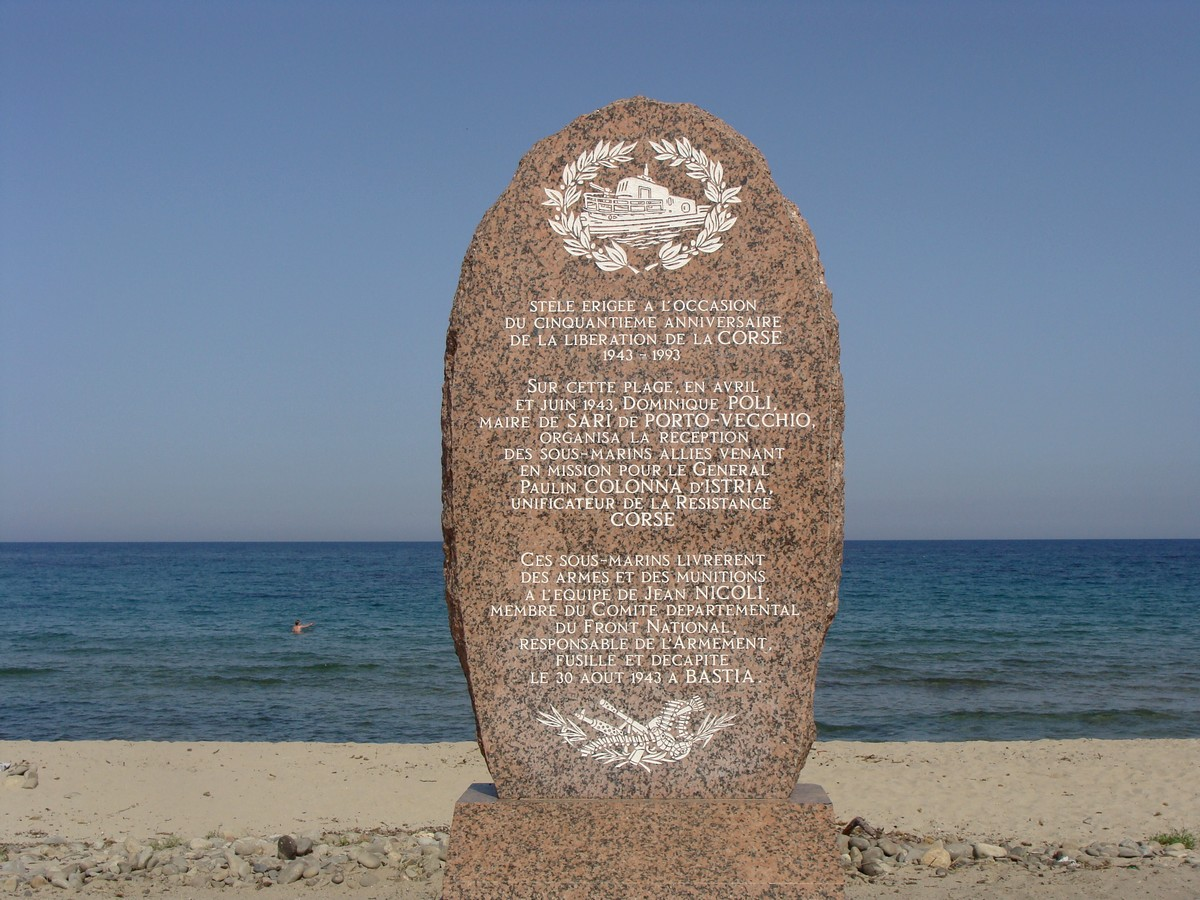 Monument commémorant la libération de la Corse en 1943 (plage de la marine de Solaro, sur la côte orientale)